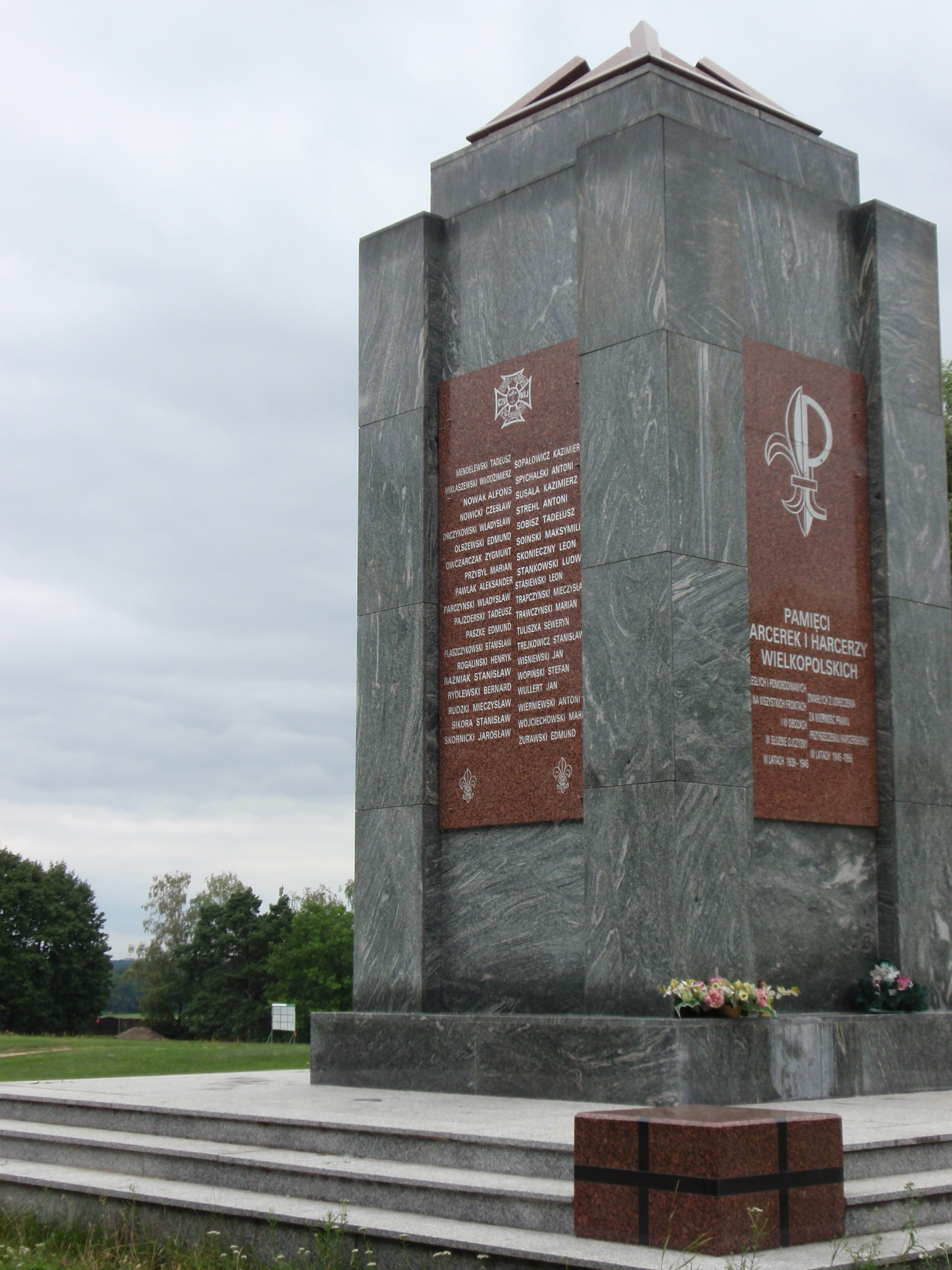 Pomnik Poległych Harcerzy - Powstańców Wielkopolskich w Poznaniu, rok powstania: 2013 (surowa bryła bez wystroju - 1992), autor: Klemens Mikuła, współrzędne geograficzne: 52.3981971"N 16.9834004"E